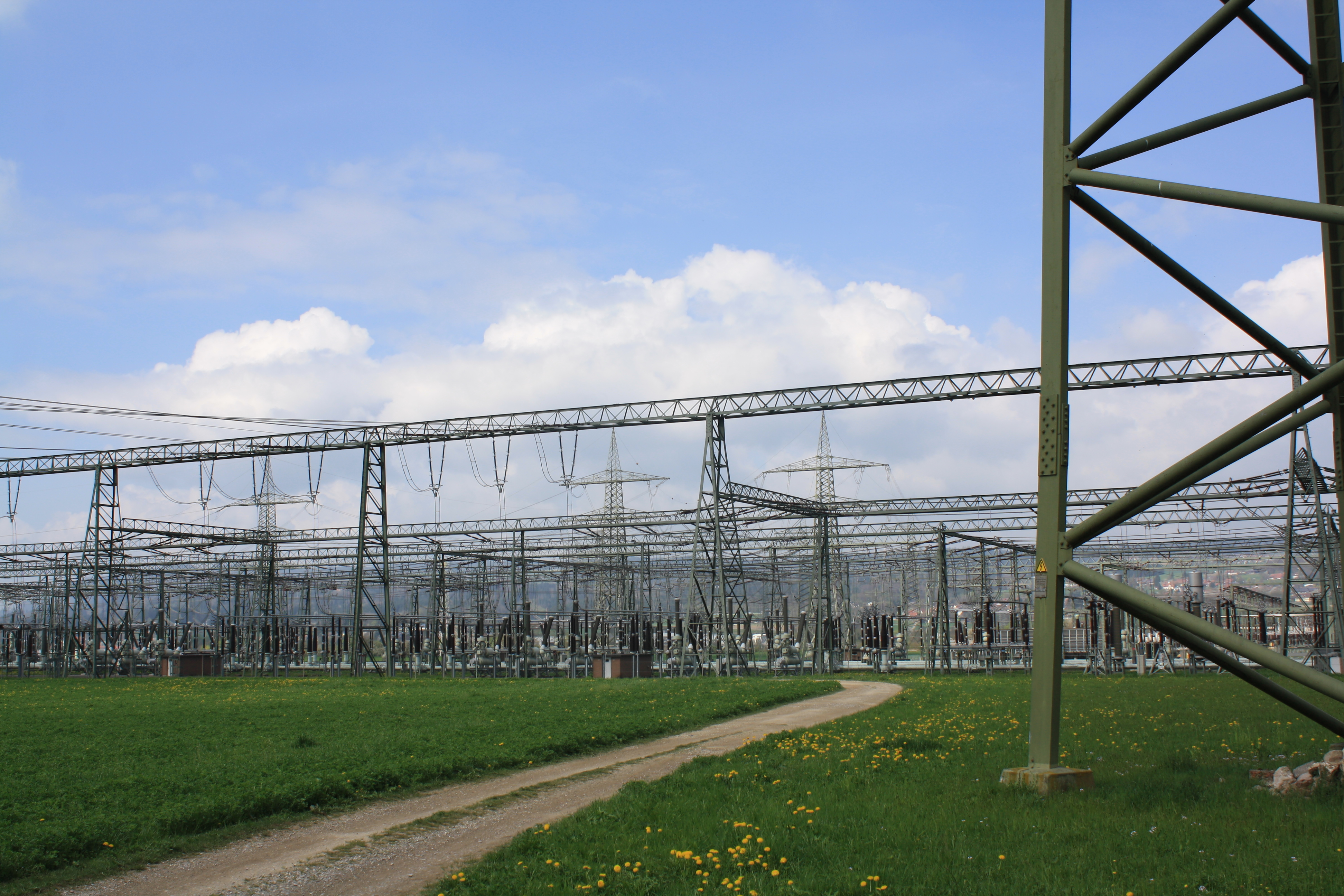 Umspannwerk Laufenburg, Gemeinde Kaisten, Kanton Aargau